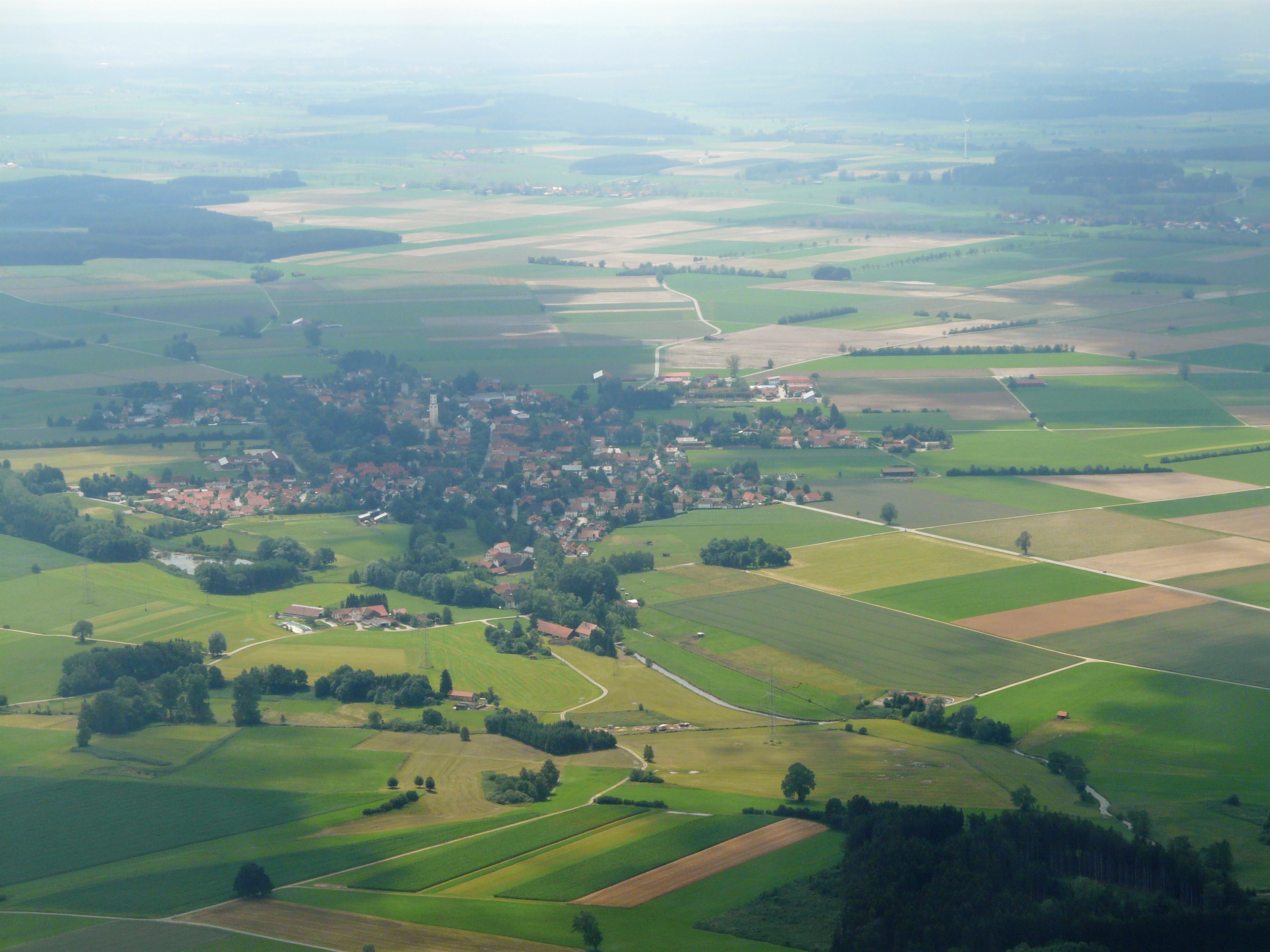 Waal (Allgäu) von oben